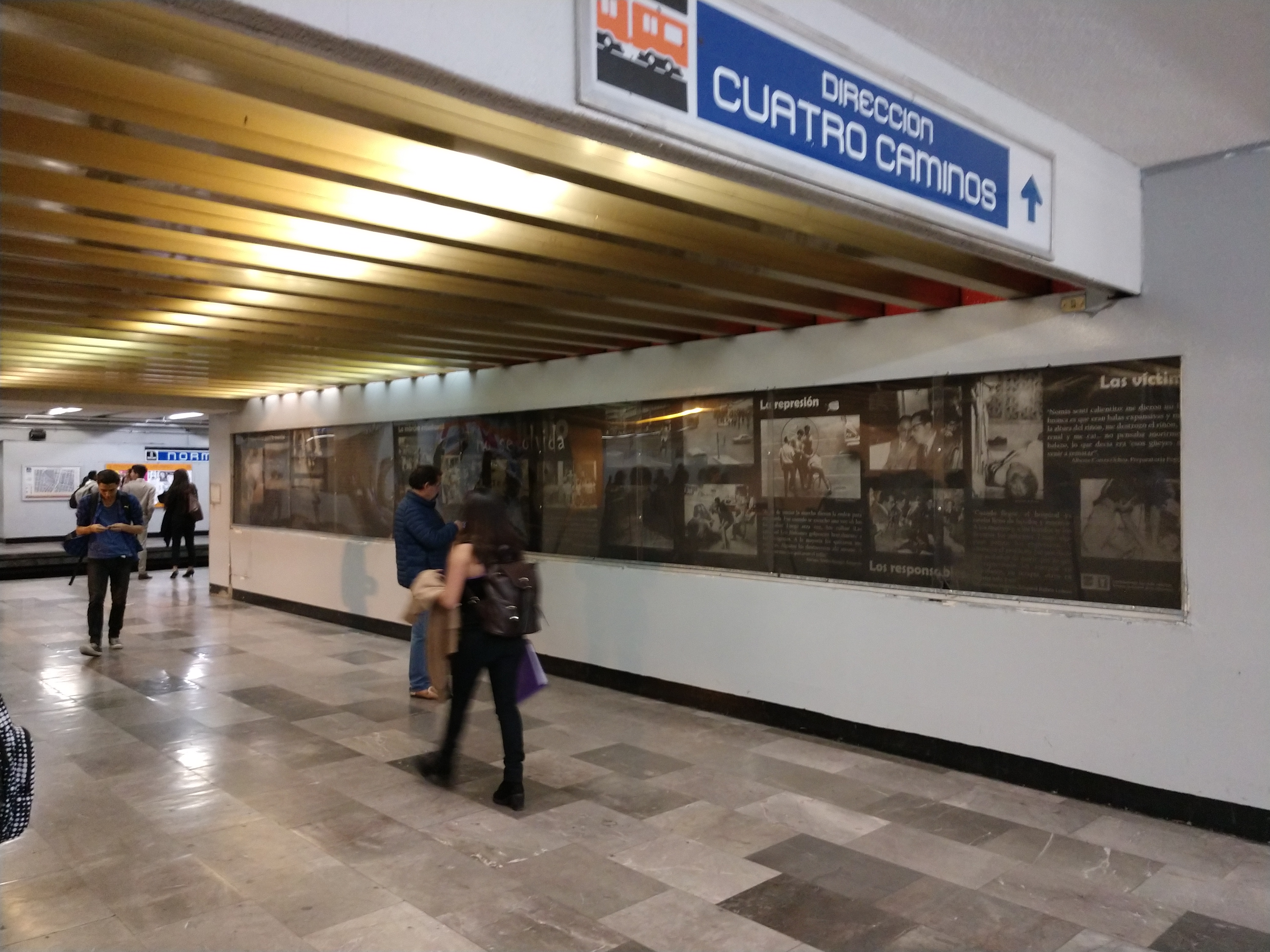 Estación del metro Normal del metro de la ciudad de México.